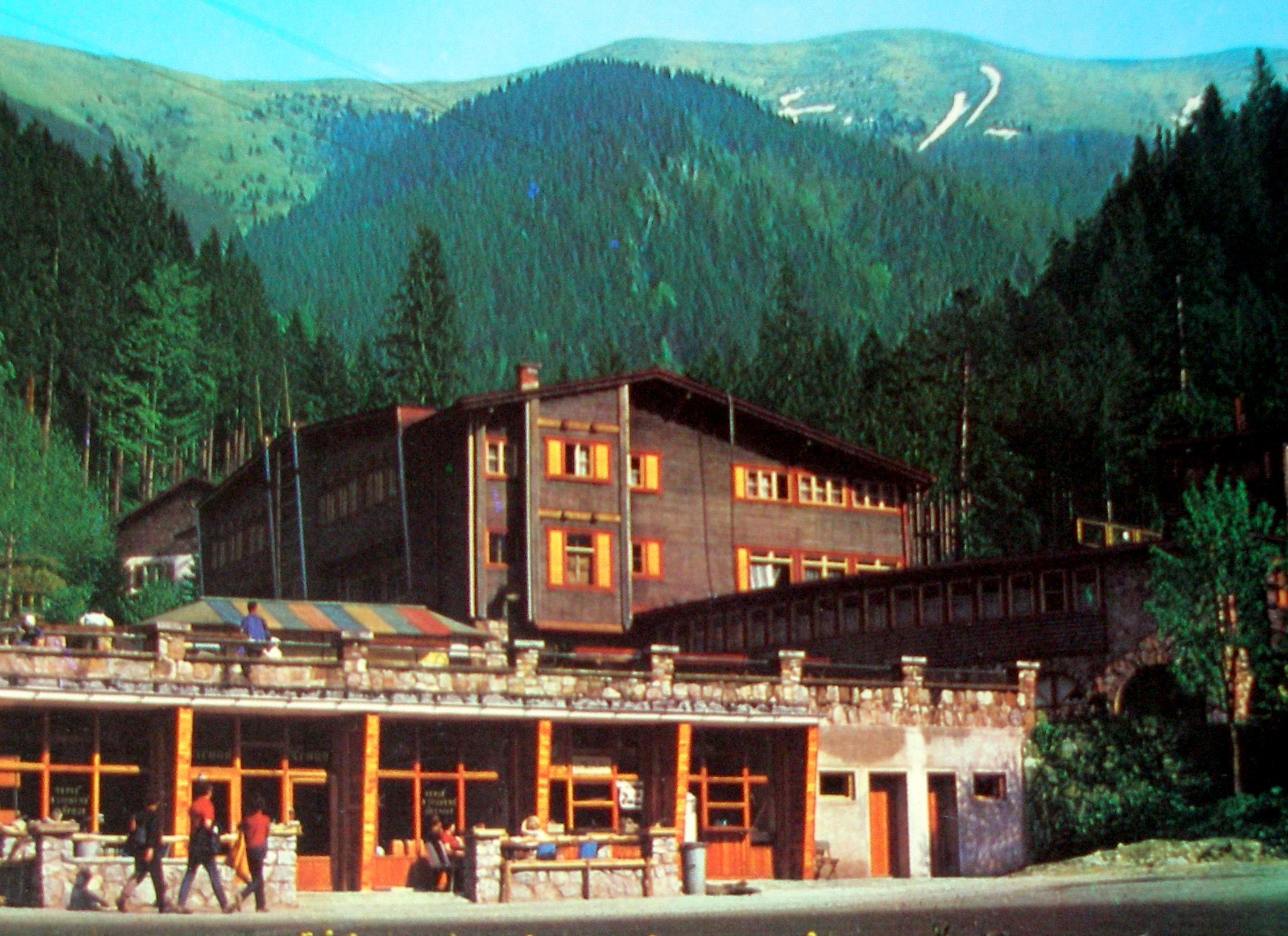 Hotel vo Vrátnej doline. Rok 1972.